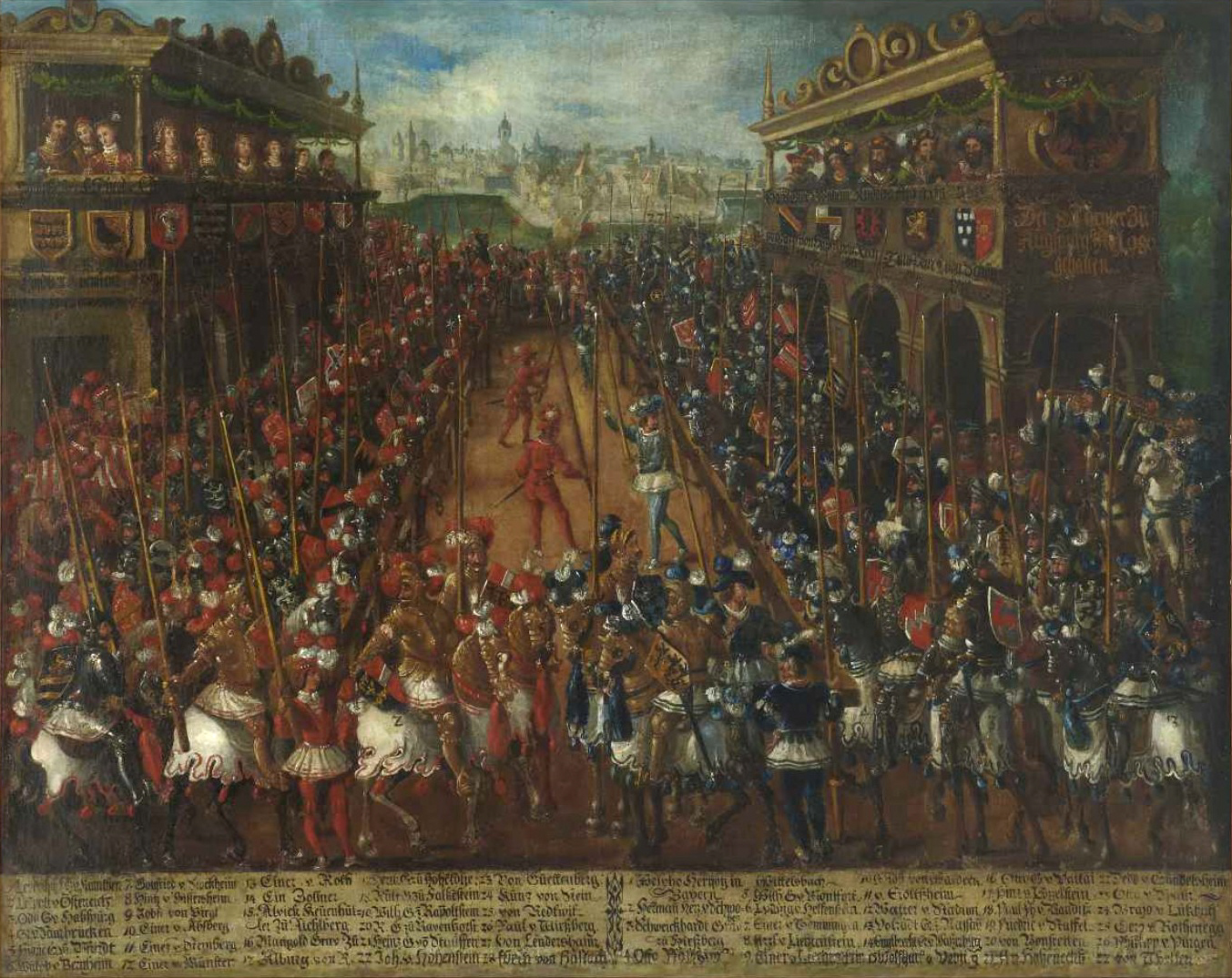 Der 8. Turnier zu Augspurg Ao 1080 gehalten (eines der fiktiven Turnier aus Georg Rüxners „Turnierbuch“). Öl auf Leinwand, 115,5 x 145 cm